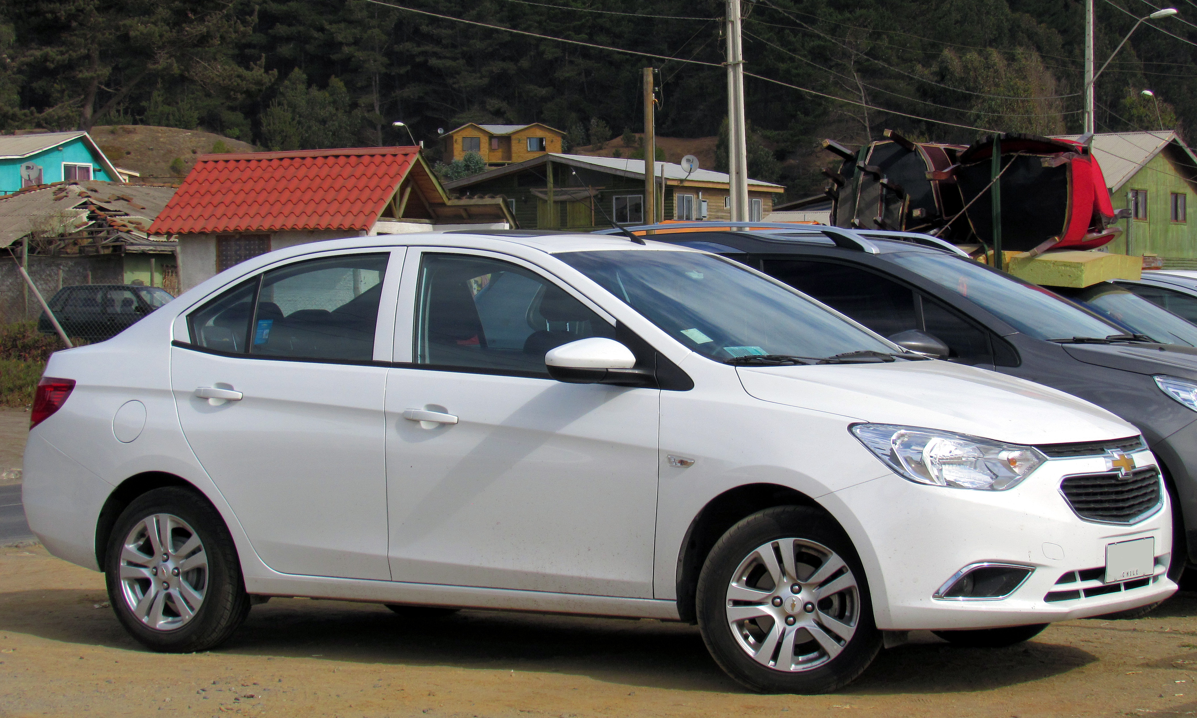 Chevrolet Sail 1.5 LT 2016